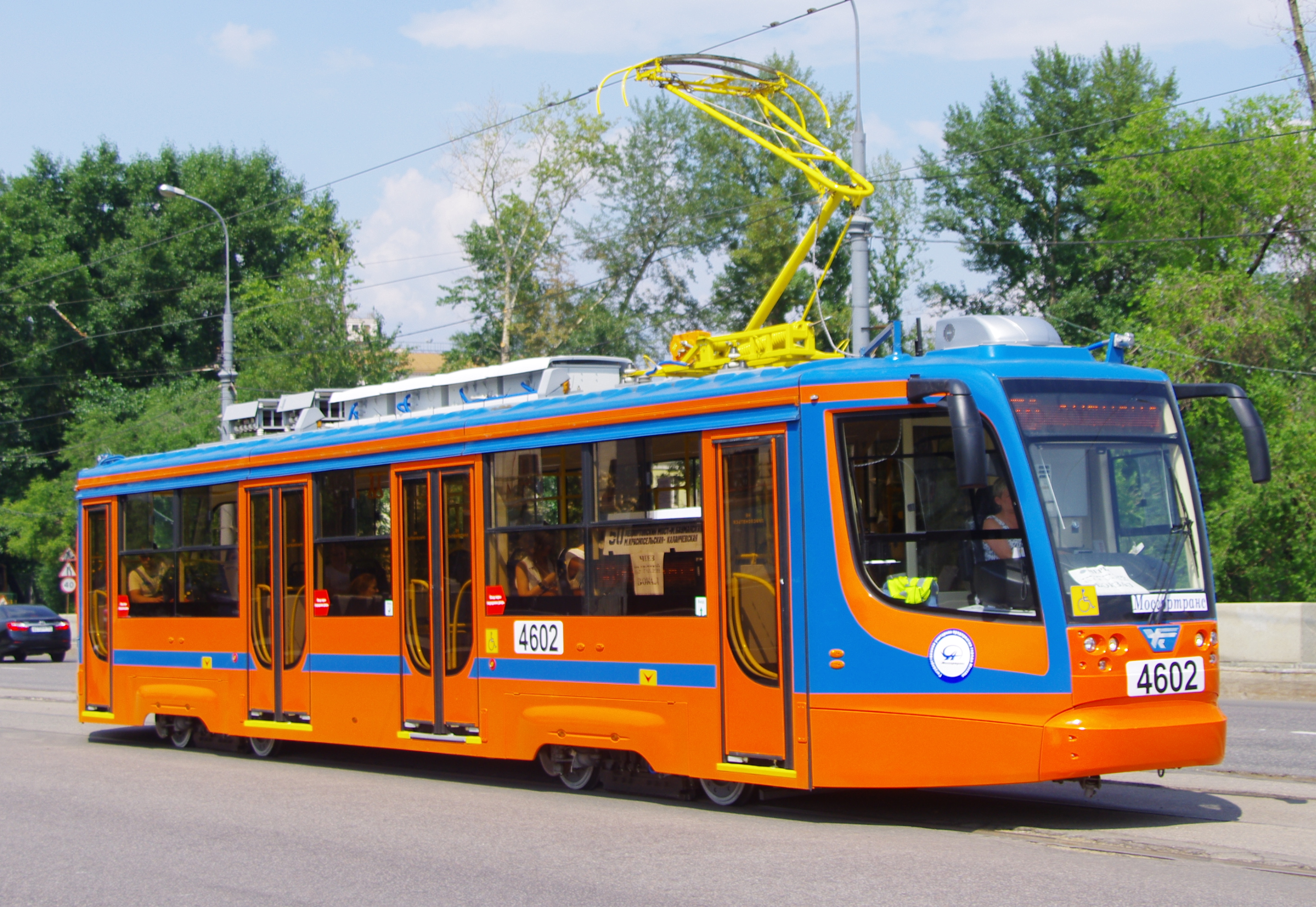 Moscow tram 2013 71-623 4602